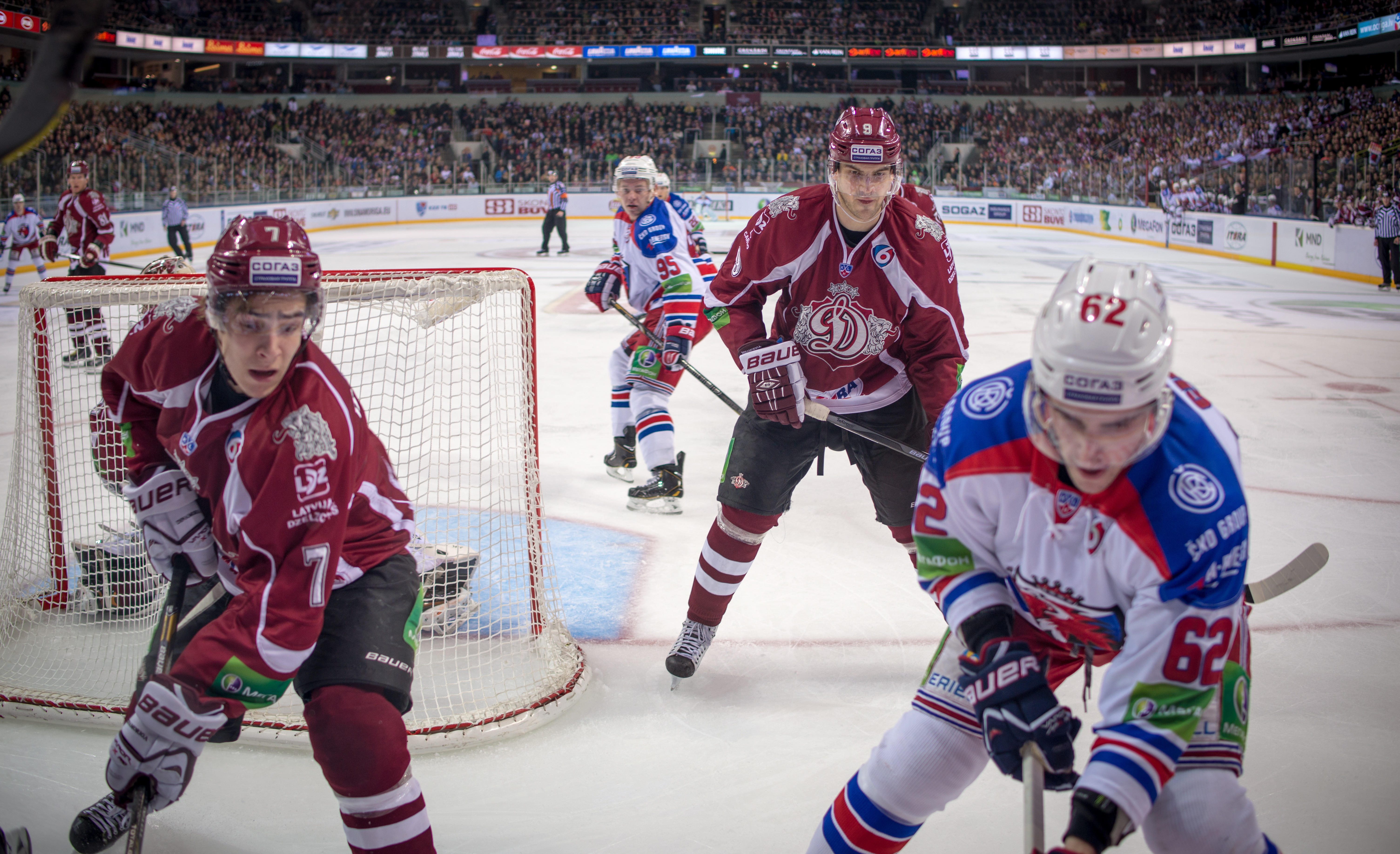 Dinamo: #7 Rustams Begovs, #9 Krisjanis Redlihs Lev: #62 Lukas Cingel, #95 Jakub Matai Dinamo Riga vs HC Lev Praha 2013-12-28, Arena Riga